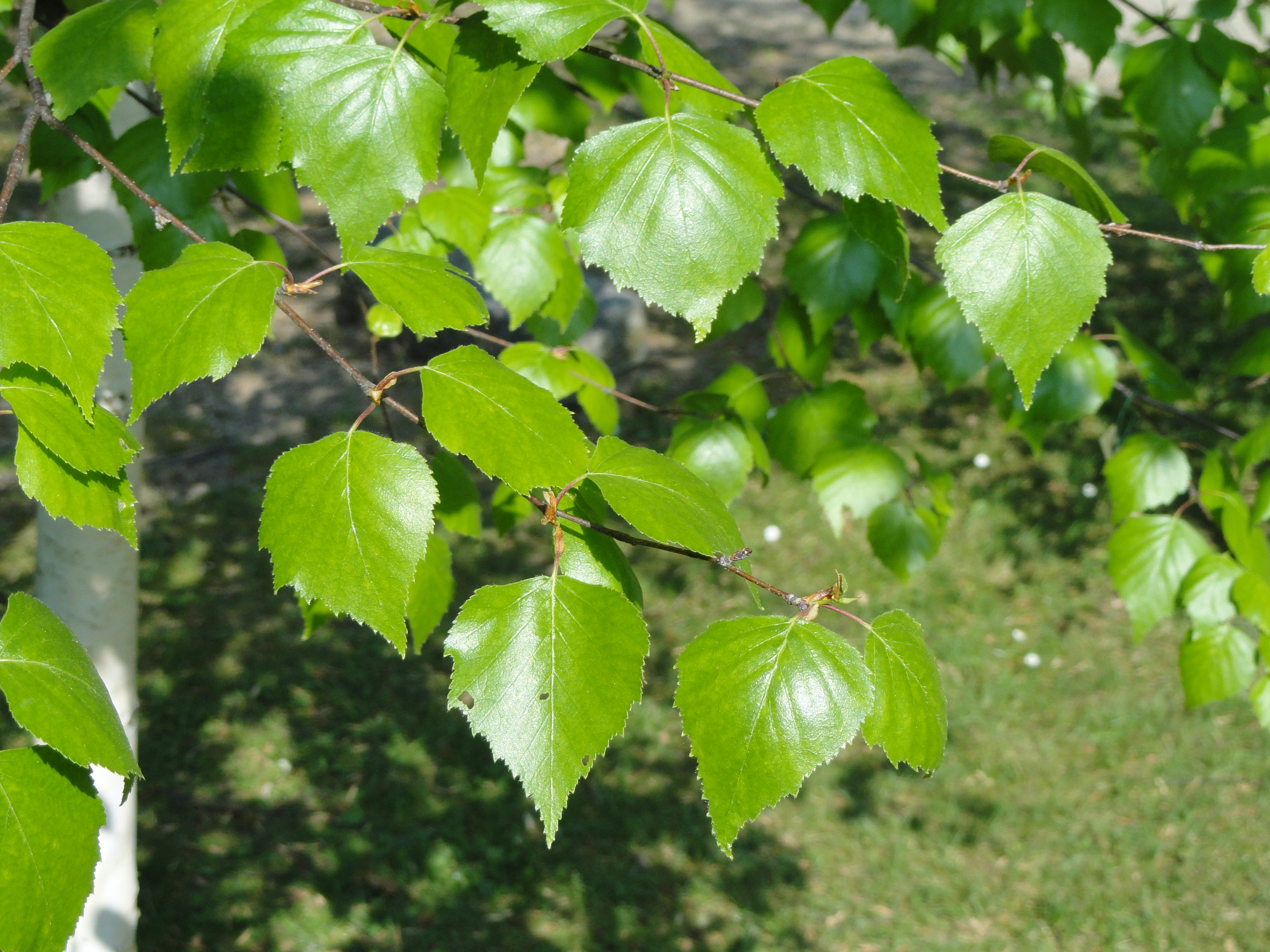 Betula szechuanica specimen in the Villa Carlotta (Tremezzo), on Lake Como, Italy.